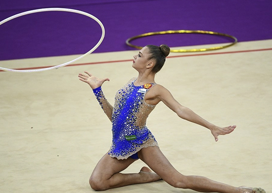 Российская гимнастка, член сборной команды России, двукратная чемпионка мира в командном зачёте (2014, 2015), чемпионка Европы по художественной гимнастике (2015), чемпионка России в индивидуальном многоборье (2016), бронзовый призёр в многоборье чемпионата России по художественной гимнастике (2014) Александра Солдатова